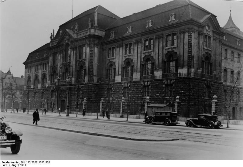 Berlin, Oberverwaltungsgericht Scherl: Berlin, Oberverwaltungsgericht Hardenbergstr. 31, 10197-31 Information added by Wikimedia users.Ergänzung: Dieses Gebäude, direkt neben dem Bahnhof Zoologischer Garten gelegen, war von 1952 bis 2002 Sitz des Bundesverwaltungsgerichts, das anschließend nach Leipzig übersiedelte.